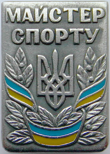 Майстер спорту України